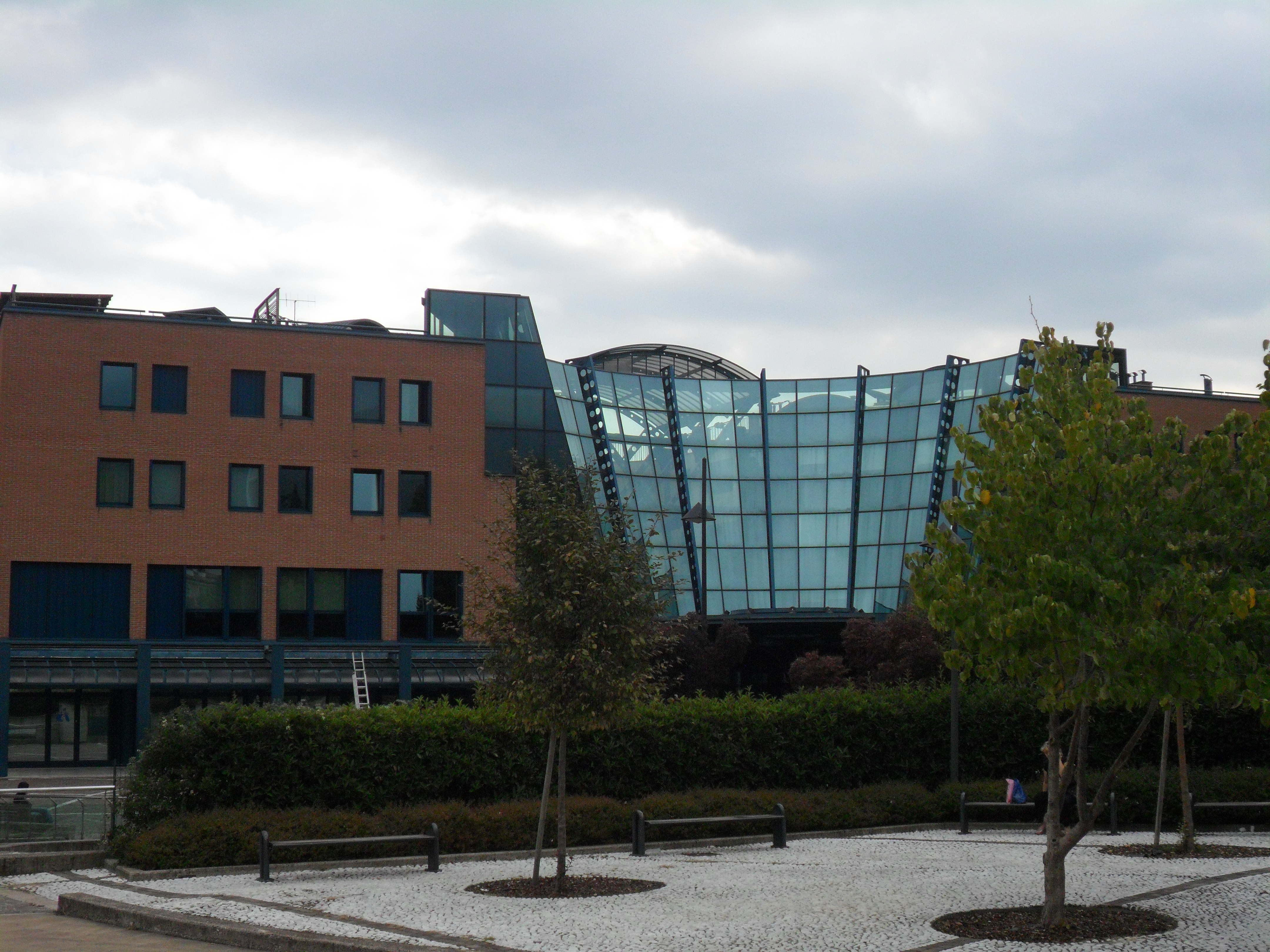 Schio, piazza Borsellino Falcone